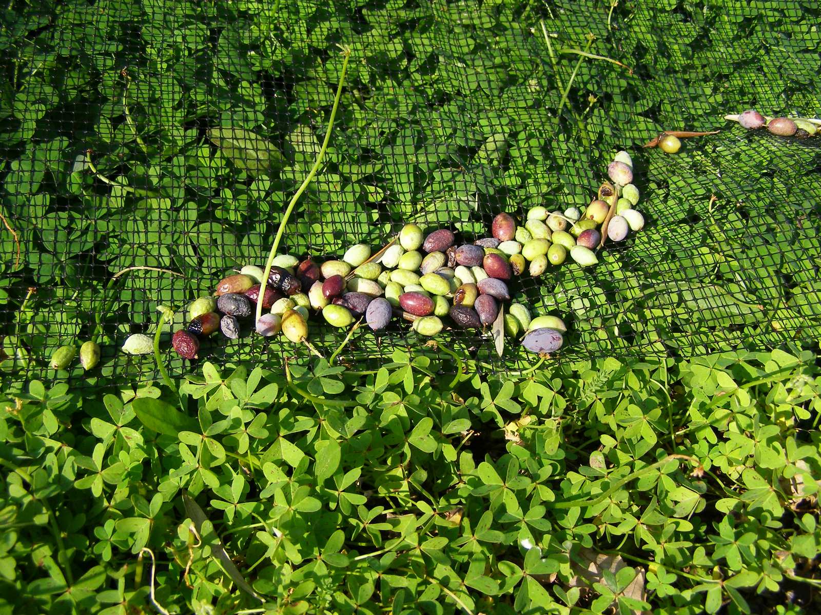 Oliven im Sammelnetz auf Sauerklee